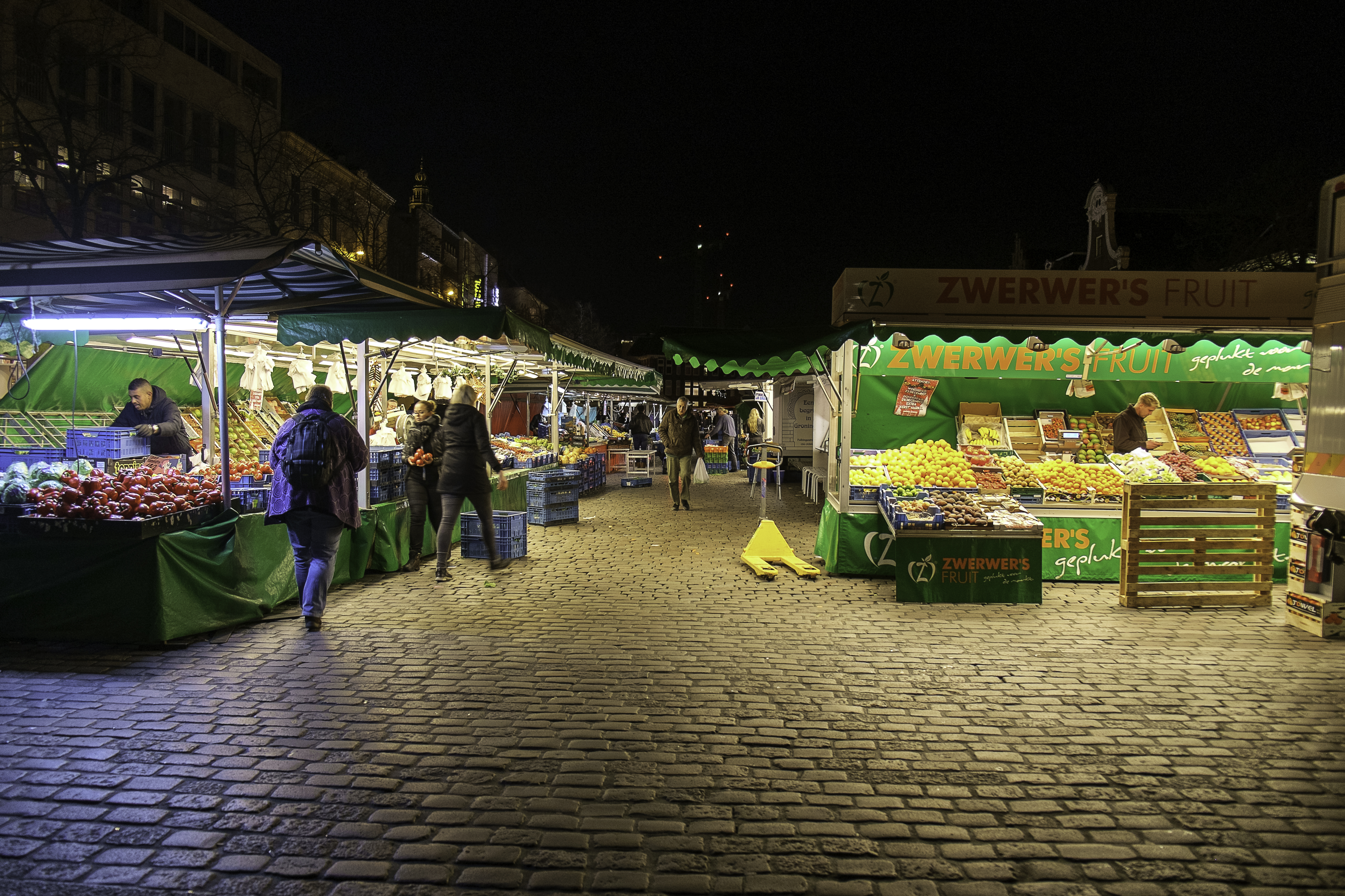 marktkramen op de Groningse Vismarkt